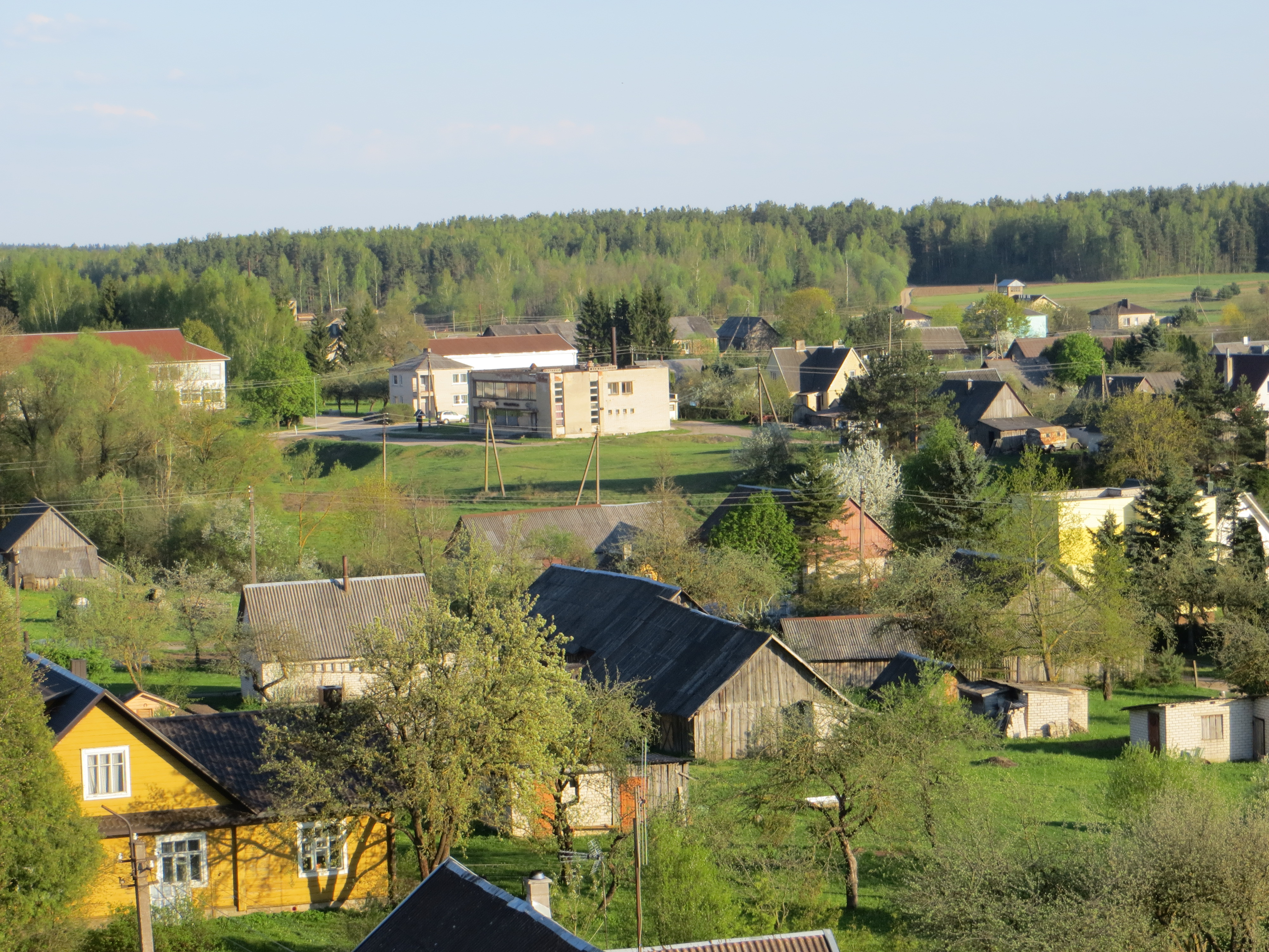 Suginčiai, Lithuania